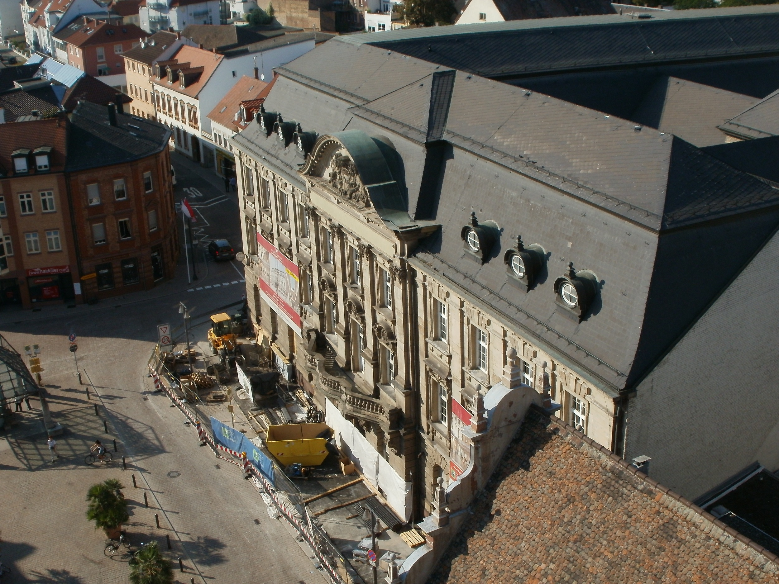 Ehem. Oberpostdirektion (Speyer)